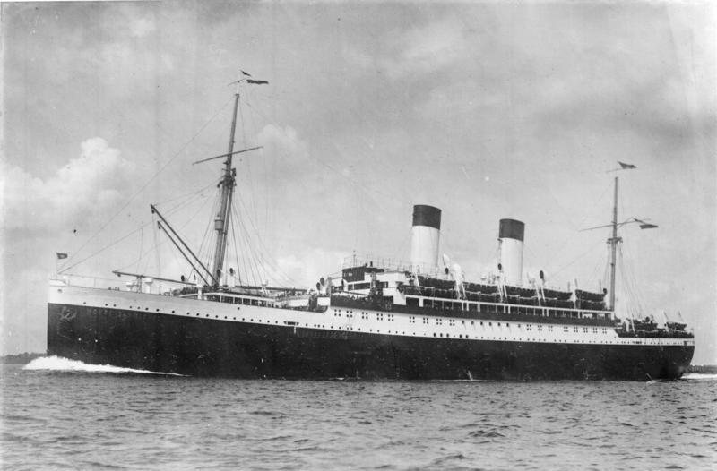 Der deutsche Dampfer "Monte Cervantes" untergegangen! Das deutsche Motorschiff "Monte Cervantes" der Hamburg Süd-Amerikanischen Dampfschifffahrtsgesellschaft, das vor 2 Jahren bei Spitzbergen von dem russischen Eisbrecher "Krassin" aus schwerer Seenot gerettet werden mußte, ist an der Südspitze von Amerika, in der Magellanstrasse auf Grund gelaufen und untergegangen. Die Passagiere und Besatzung konnten sämtlich geborgen werden.